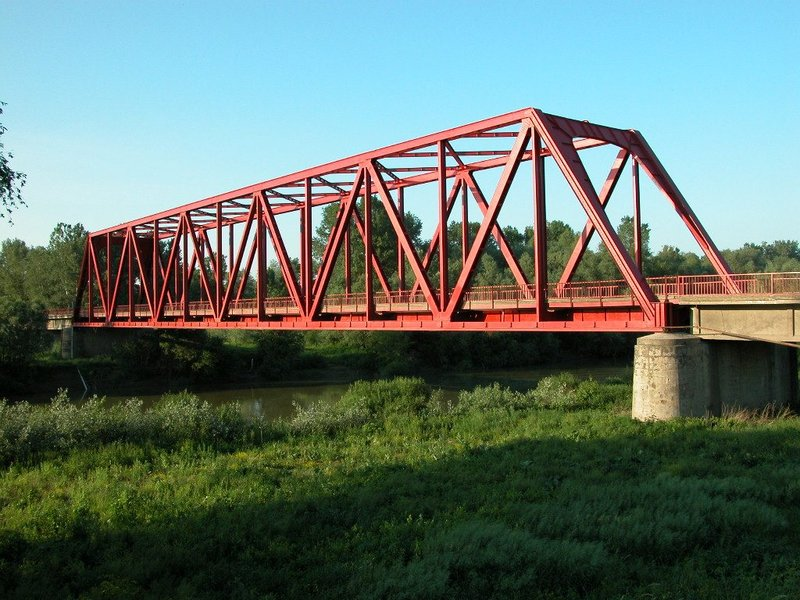 Cestný most cez rieku Bodrog pri obci Streda nad Bodrogom Licensing